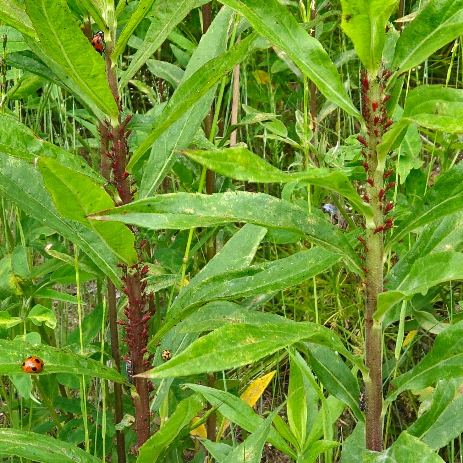 日本、東海地方